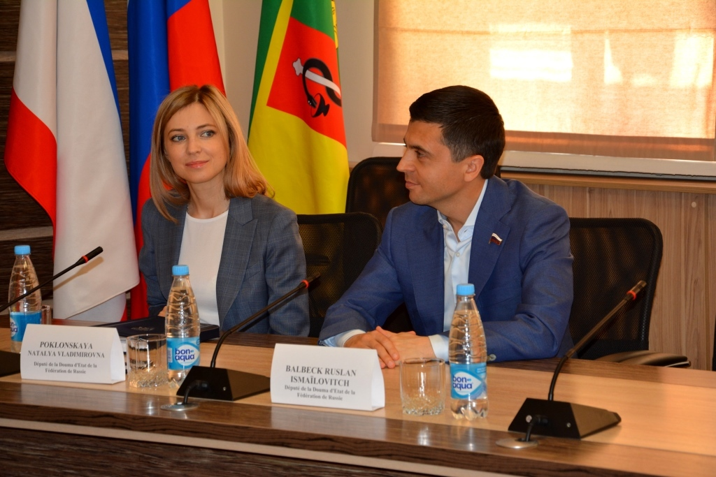 Российская Евпатория во главе с Олесей Харитоненко и французский Мариньян во главе с мэром города Эриком Лье Диссэ подписали соглашение и стали побратимами. На подписании соглашения об установлении побратимских связей присутствовали депутаты Государственной Думы РФ Руслан Бальбек и Наталья Поклонская, глава администрации Евпатории Андрей Филонов, председатель Контрольно-счетной палаты города Наталья Кудеревко, депутаты горсовета, общественники и почетные жители города. Французскую сторону представляли вице-мэр Мариньяна по вопросам образования и воспитания детей раннего возраста госпожа Вероник Прадэль и глава представительства ДНР во Франции господин Юбер Файяр.